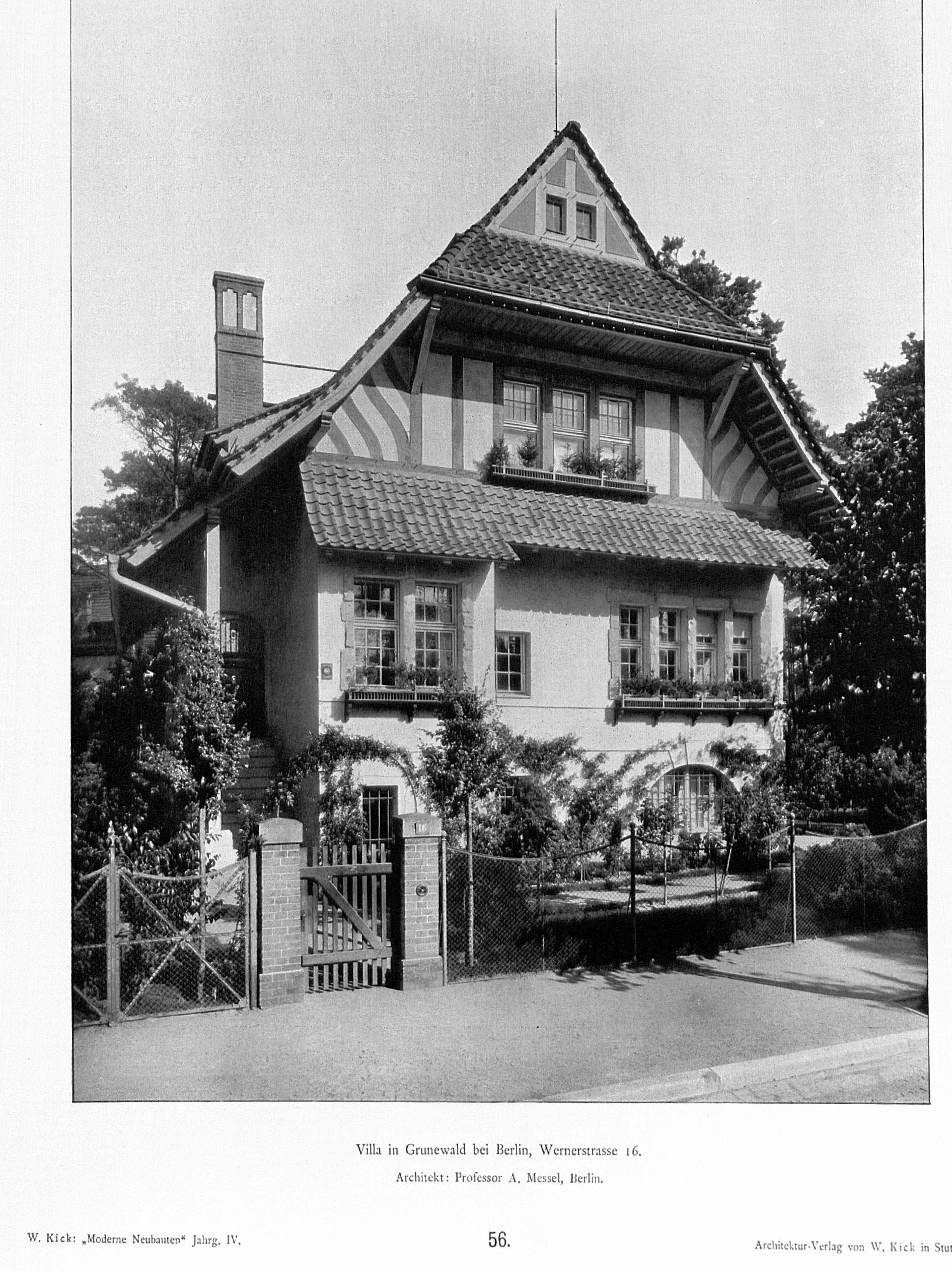 Villa Wernerstraße 16 in Berlin-Grunewald; erbaut nach Entwurf von Alfred Messel; nicht erhalten